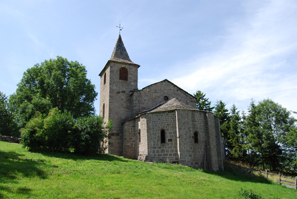 Stvoy